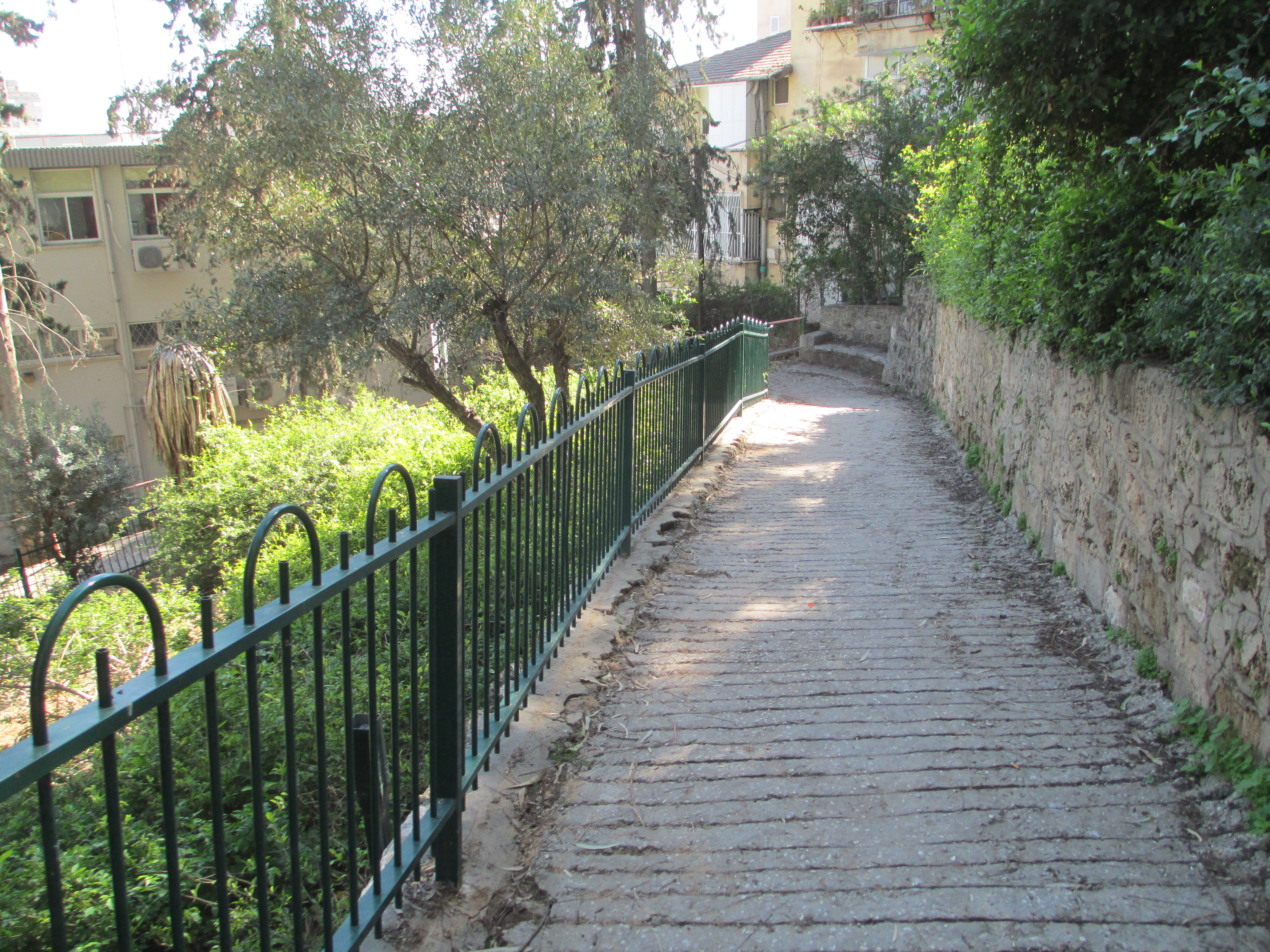 השביל המחבר את גן שאול עם רחוב המעגל ברמת גן